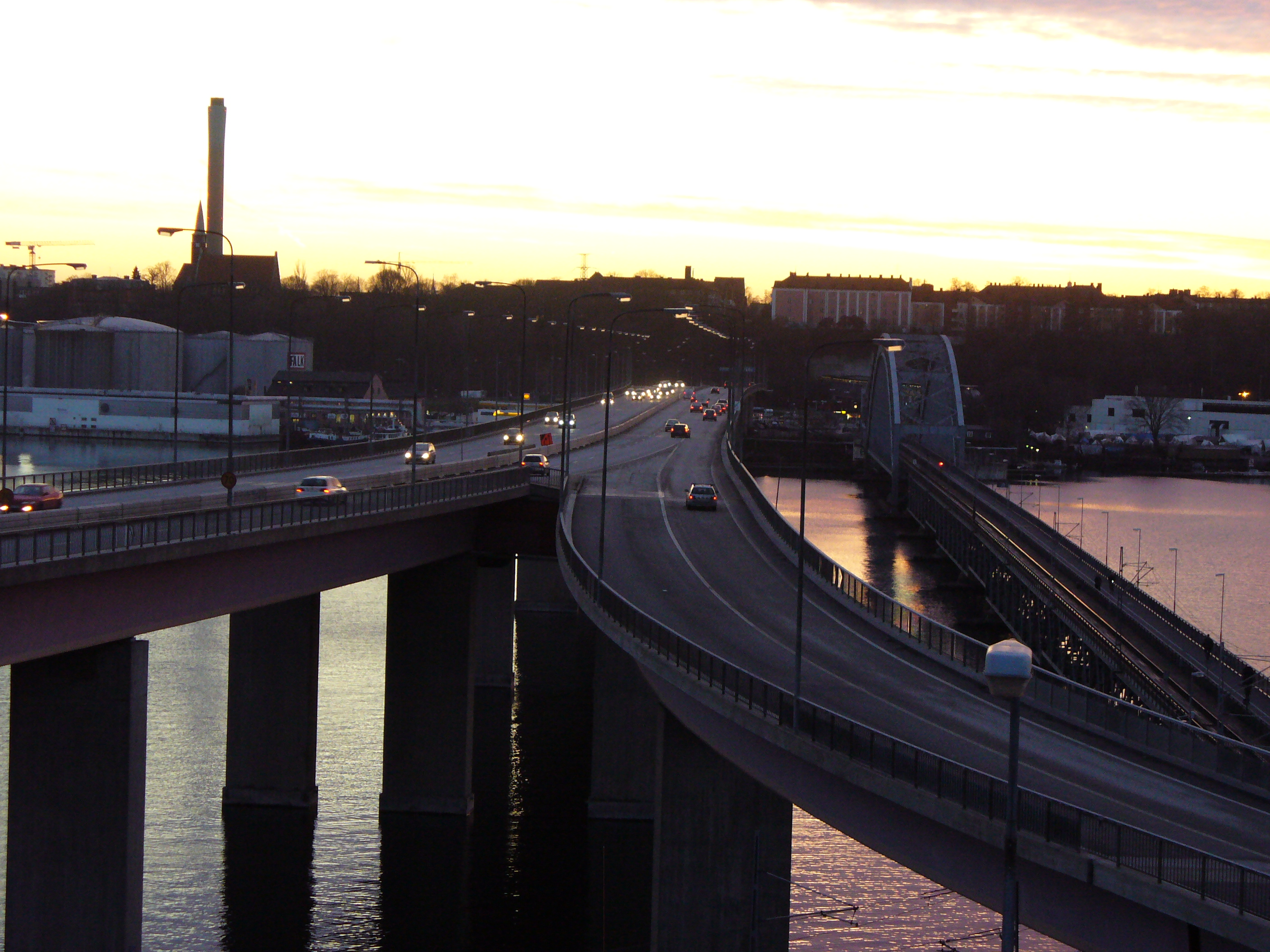 Lidingö Bridges, Lidingö, Sweden at sunset